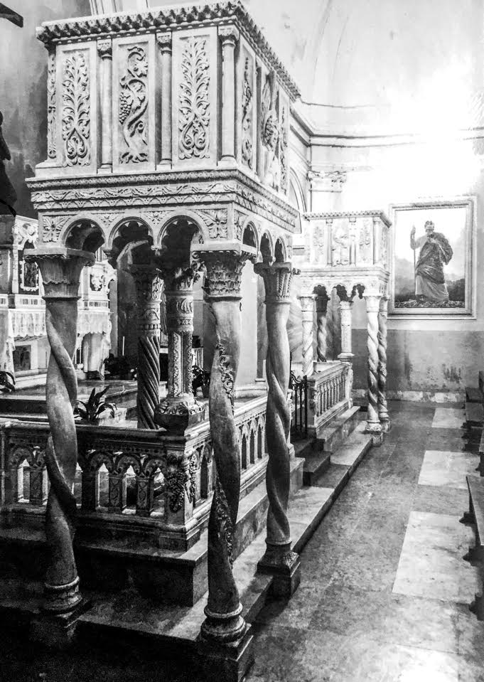 Amboni e Balaustrata, CHiesa di San Michele Arcangelo, Castiglione Messer Marino (CH)